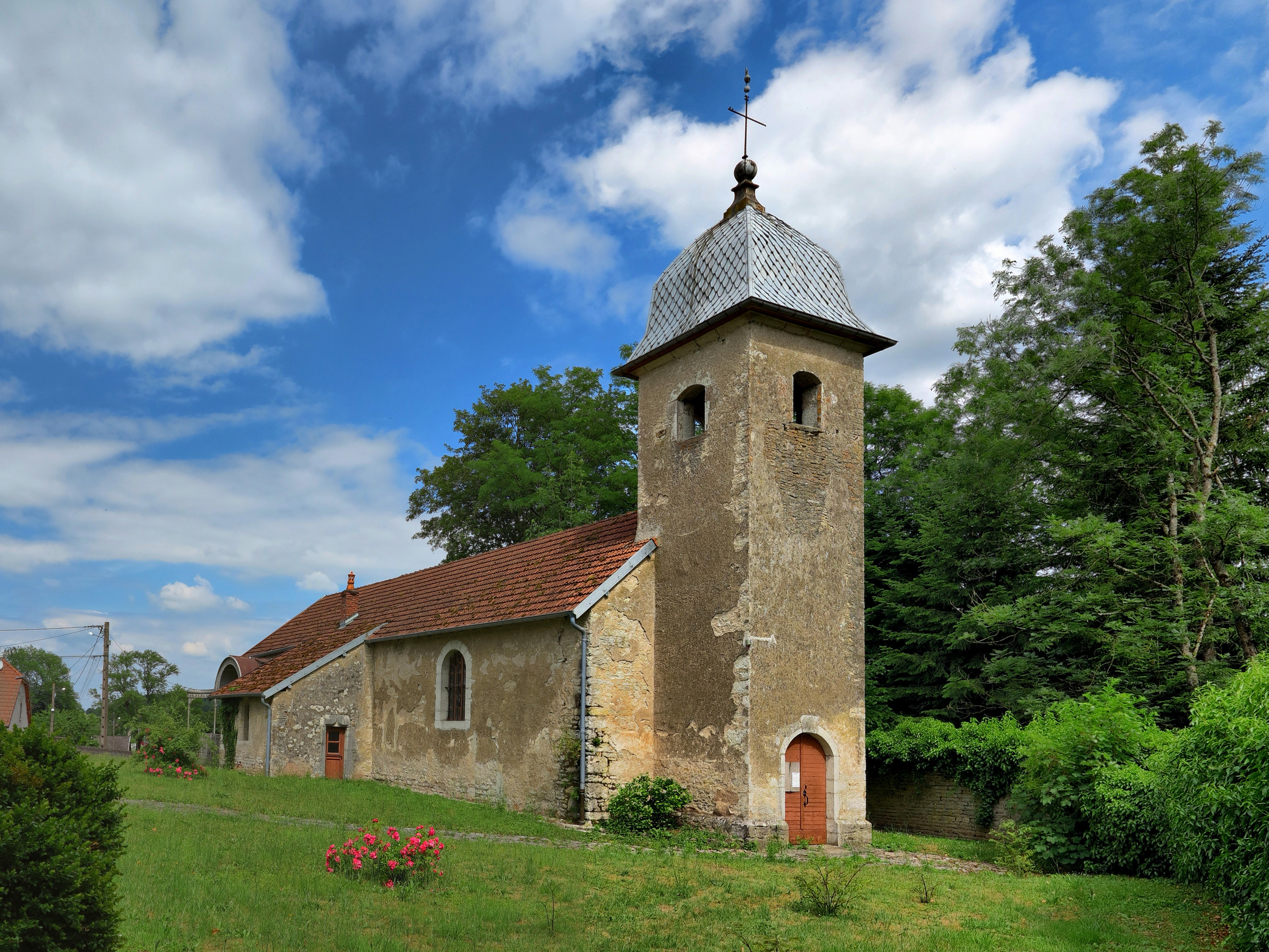 L'église de Larians